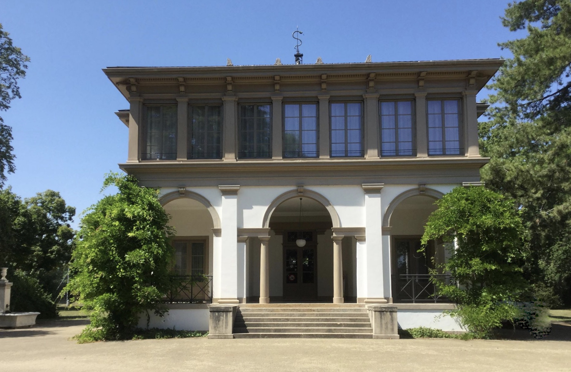 Villa Ehinger, Garten des Gymnasiums Münchenstein